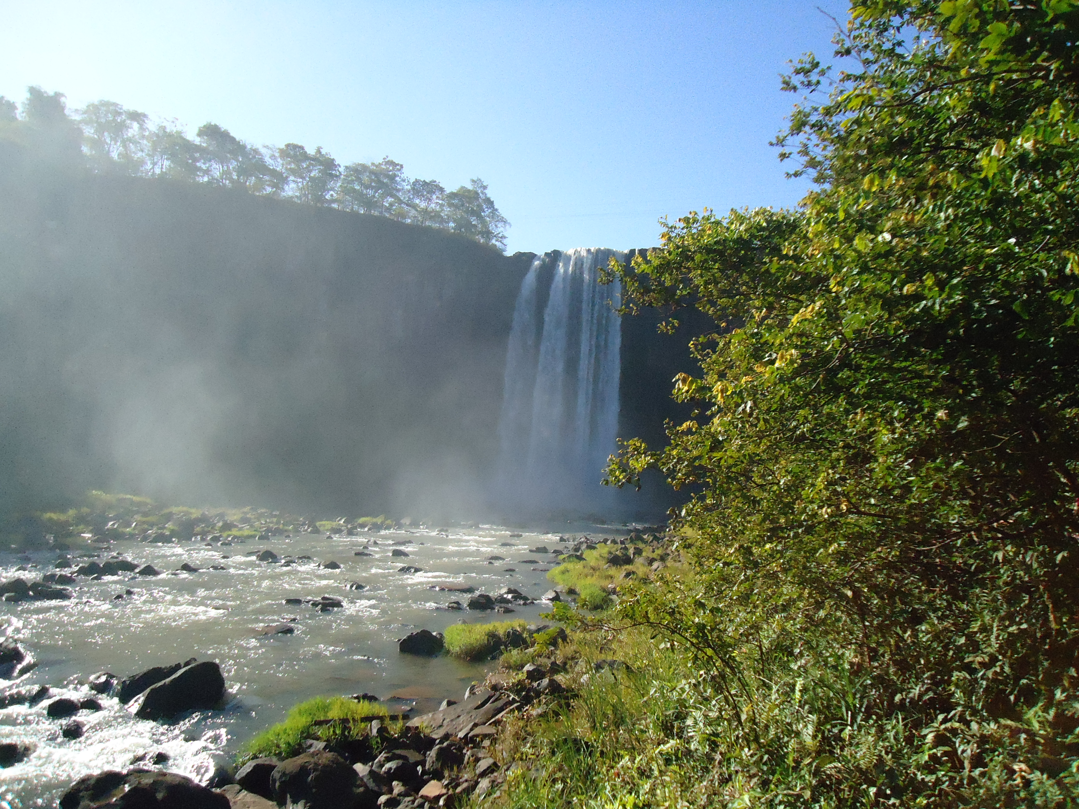 Insira_uma_descrição_para_sua_foto